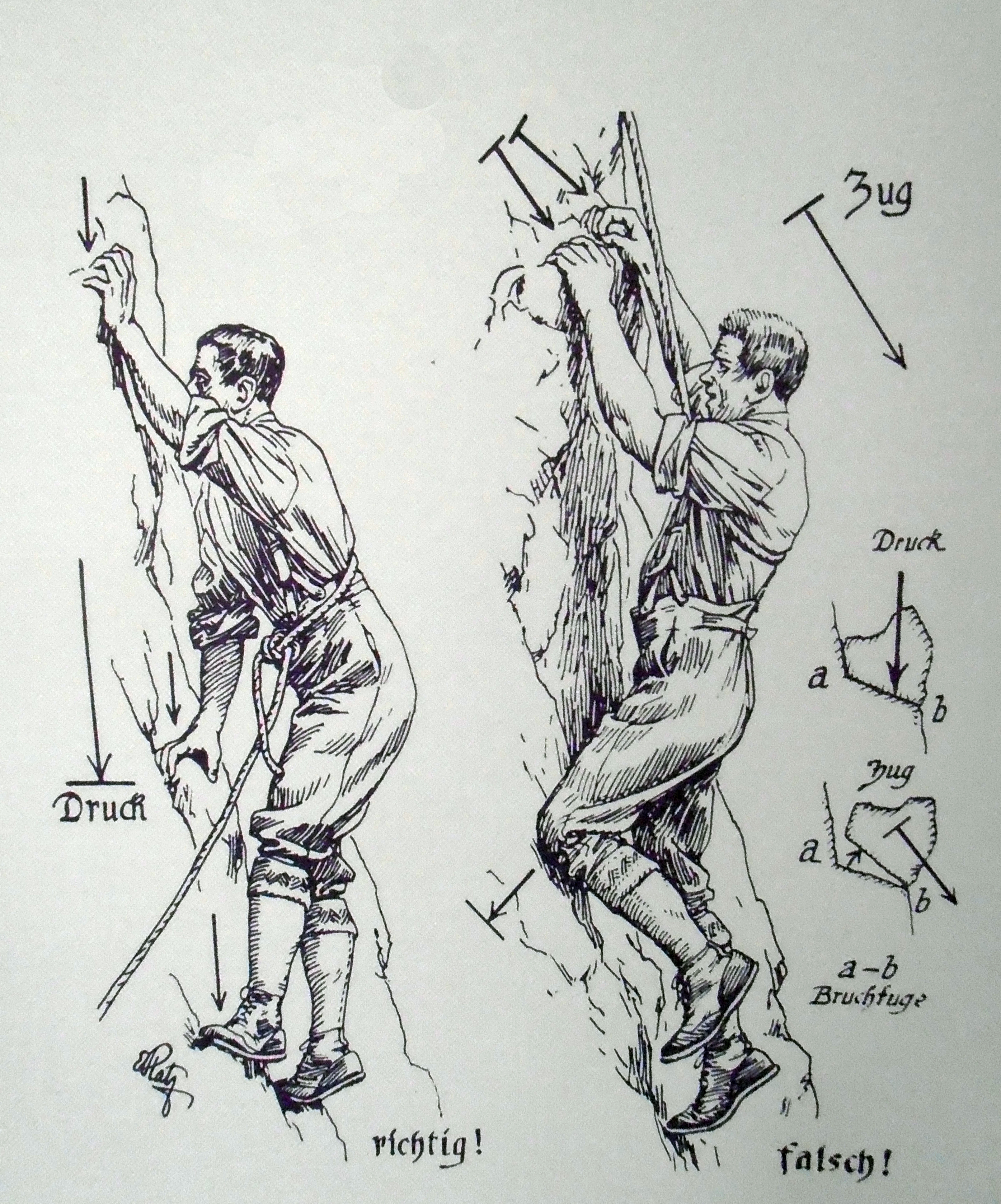 Falsches und richtiges Klettern, Illustration von Ernst Platz